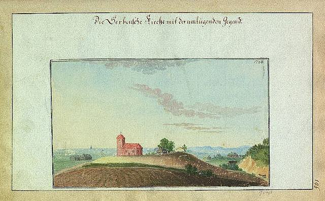 Scan from Johann Christoph Brotze's book Sammlung verschiedner Liefländischer Monumente. Die Serbensche Kirche mit der umliegenden Gegend. 1786 [K. G. Graß; die Ansicht].